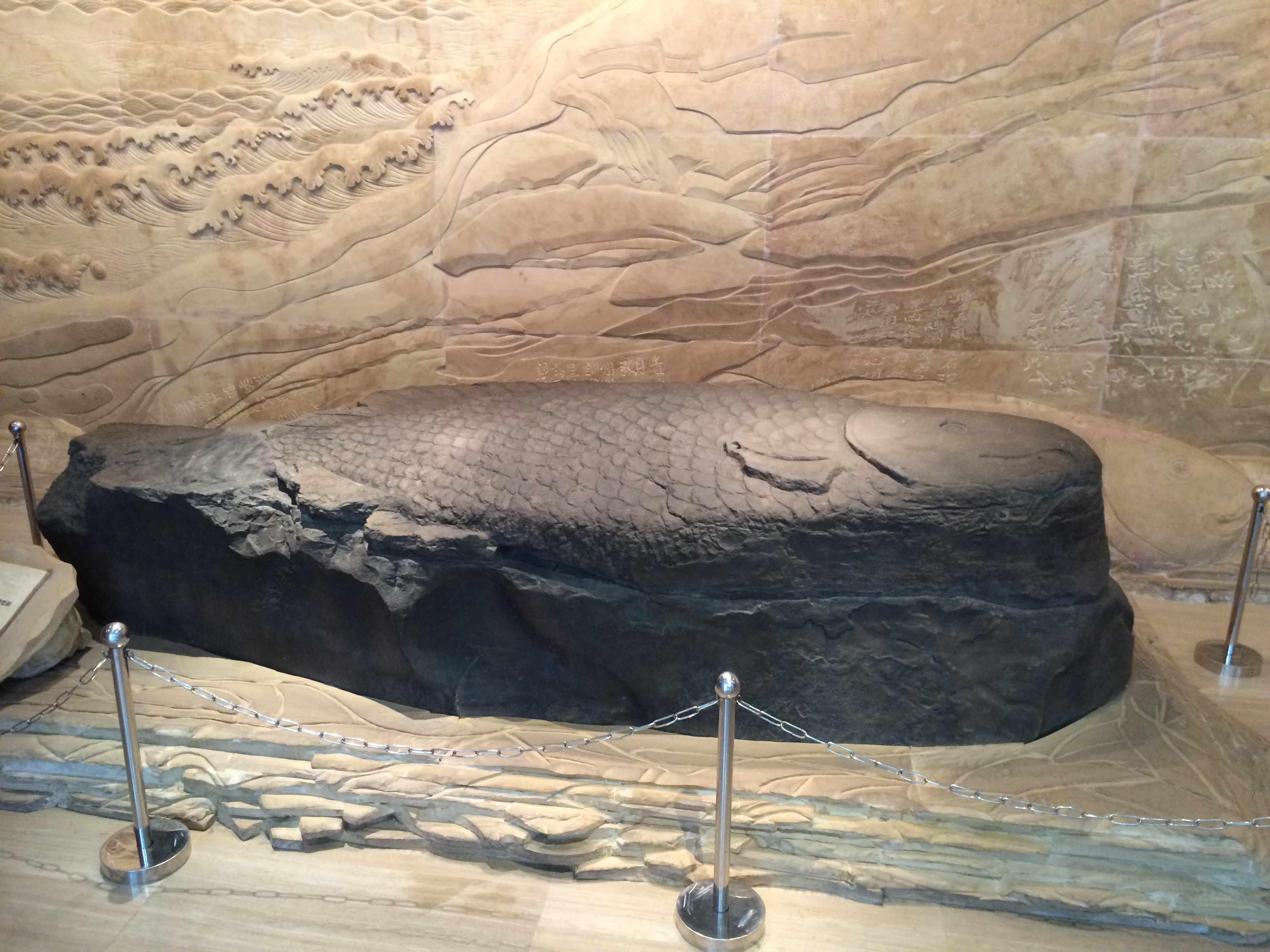 原位於重庆市涪陵长江边白鶴梁上的清代魚石刻，現藏於白鶴梁博物館